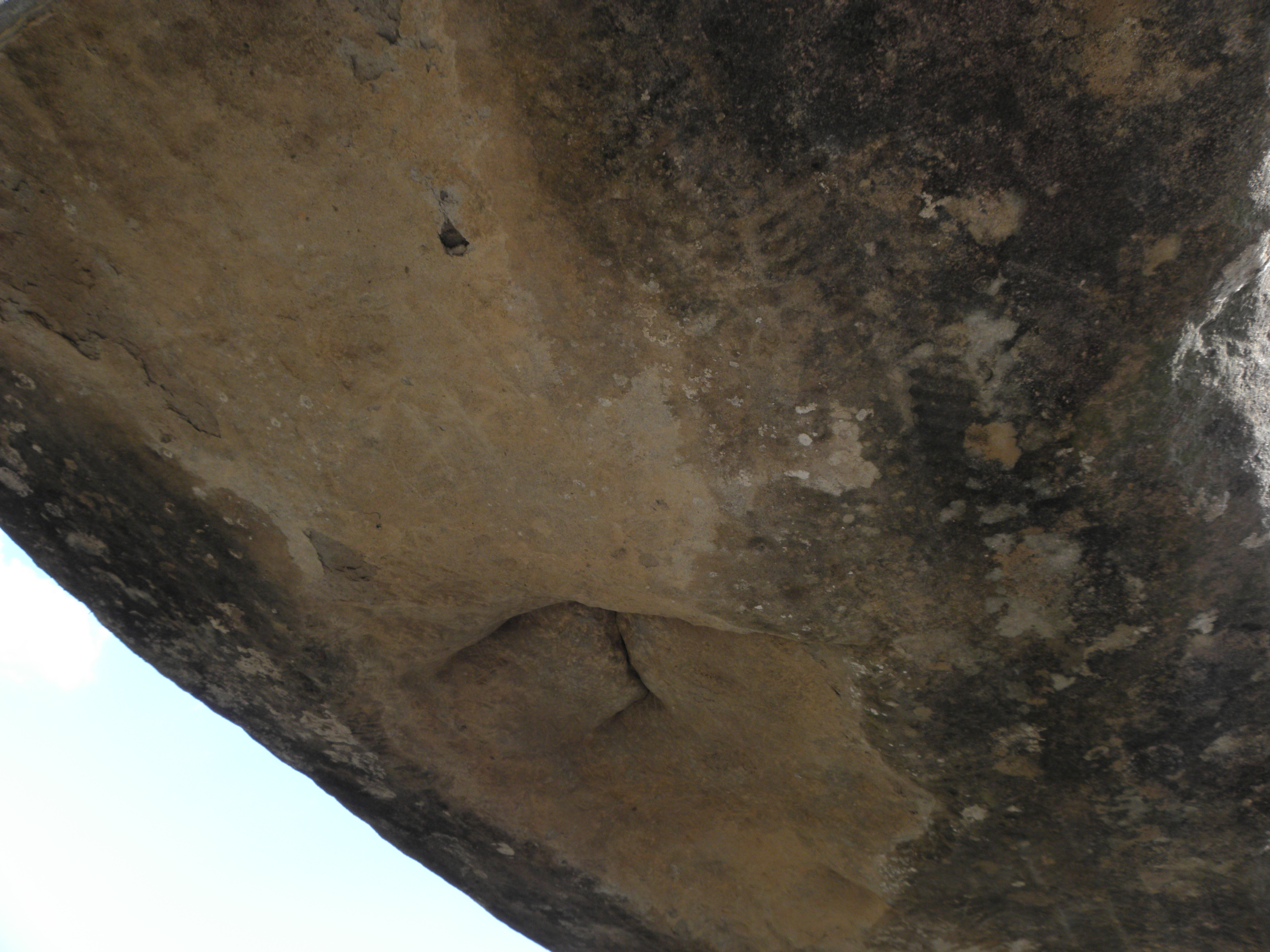 La cara inferior del roc de la Mare de Déu, a les rodalies del Santuari del Miracle (Riner, Solsonès) .